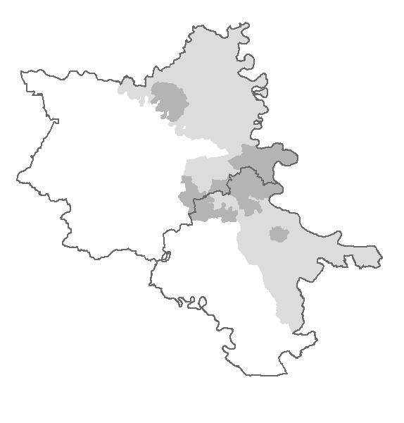 Istočna Slavonija, Baranja i zapadni Srijem na današnjoj (2011) karti Vukovarsko-srijemske i Osječko-baranjske županije i općina ZVO-a.